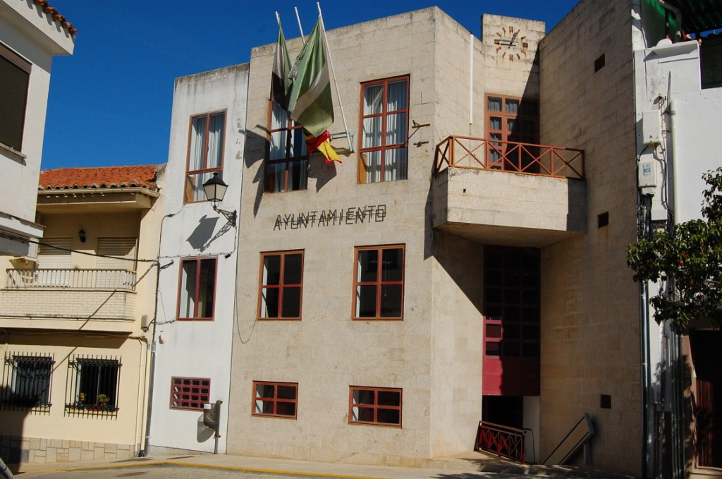 Malpartida de Plasencia, municipio de 4.486 habitantes, con una situación geográfica próxima al Valle del Ambroz, al Valle del Jerte, a la comarca de la Vera y sobre todo por su integración dentro de la delimitación del Parque Nacional de Monfragüe, destaca entre otras cosas por su Iglesia Parroquial. Es un templo de grandes proporciones que se eleva por encima de todos los edificios del municipio, hasta tal punto que desde cualquier lugar por el que nos aproximemos a se ve su majestuosa silueta dominando todo el entorno. ( Altitud -srtm3:468 m; -gtopo30:417 m; (SERVIL-W)